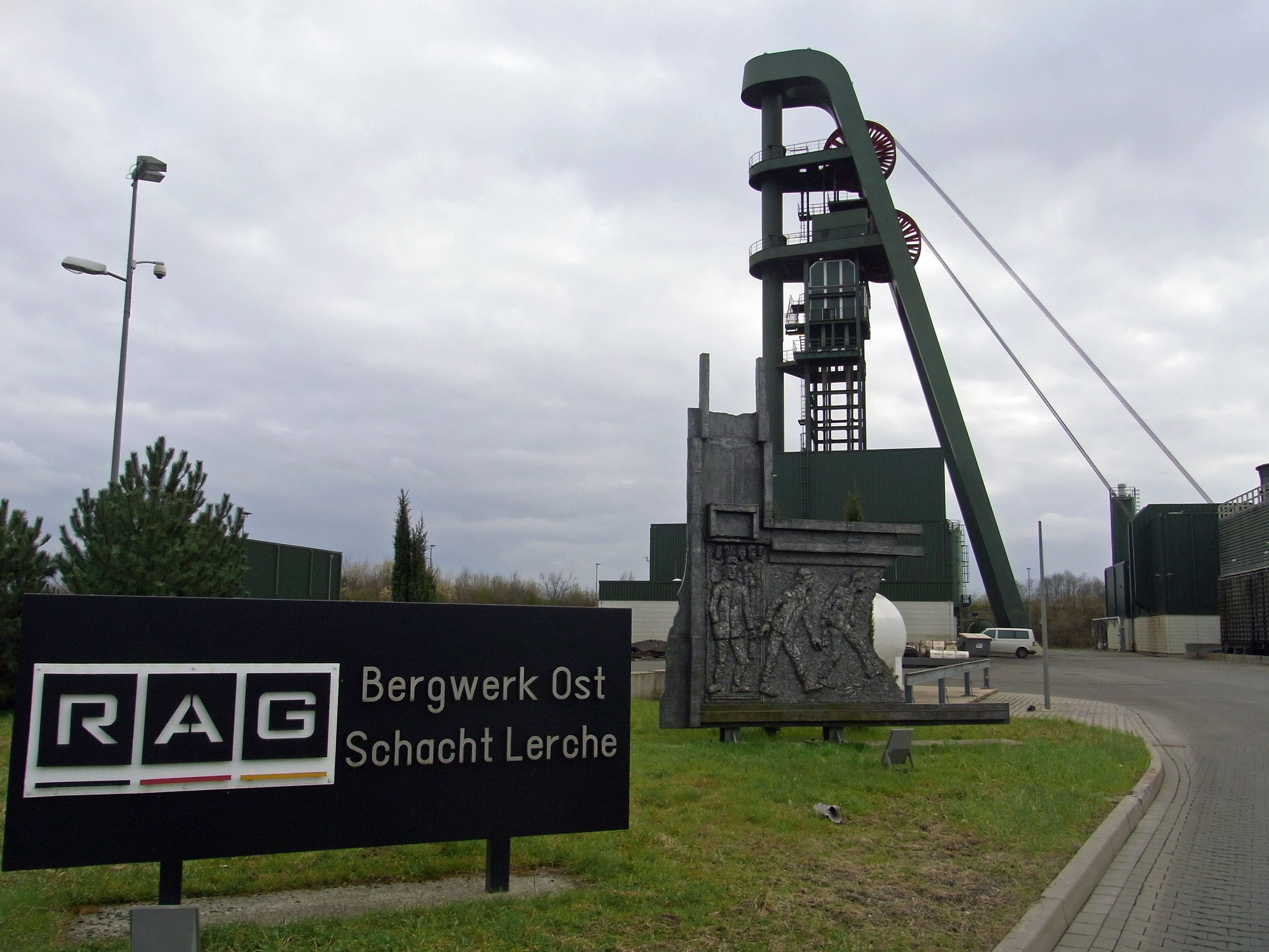 Bergwerk Ost: Schacht Lerche